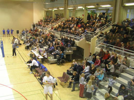 Lentopallon 1-sarjan ottelu käynnissä Savonlinnassa